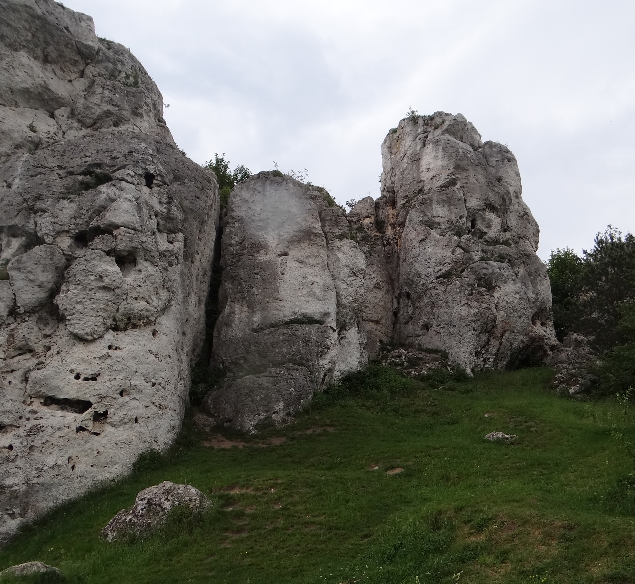 Skały Grupy Knura w Łutowcu